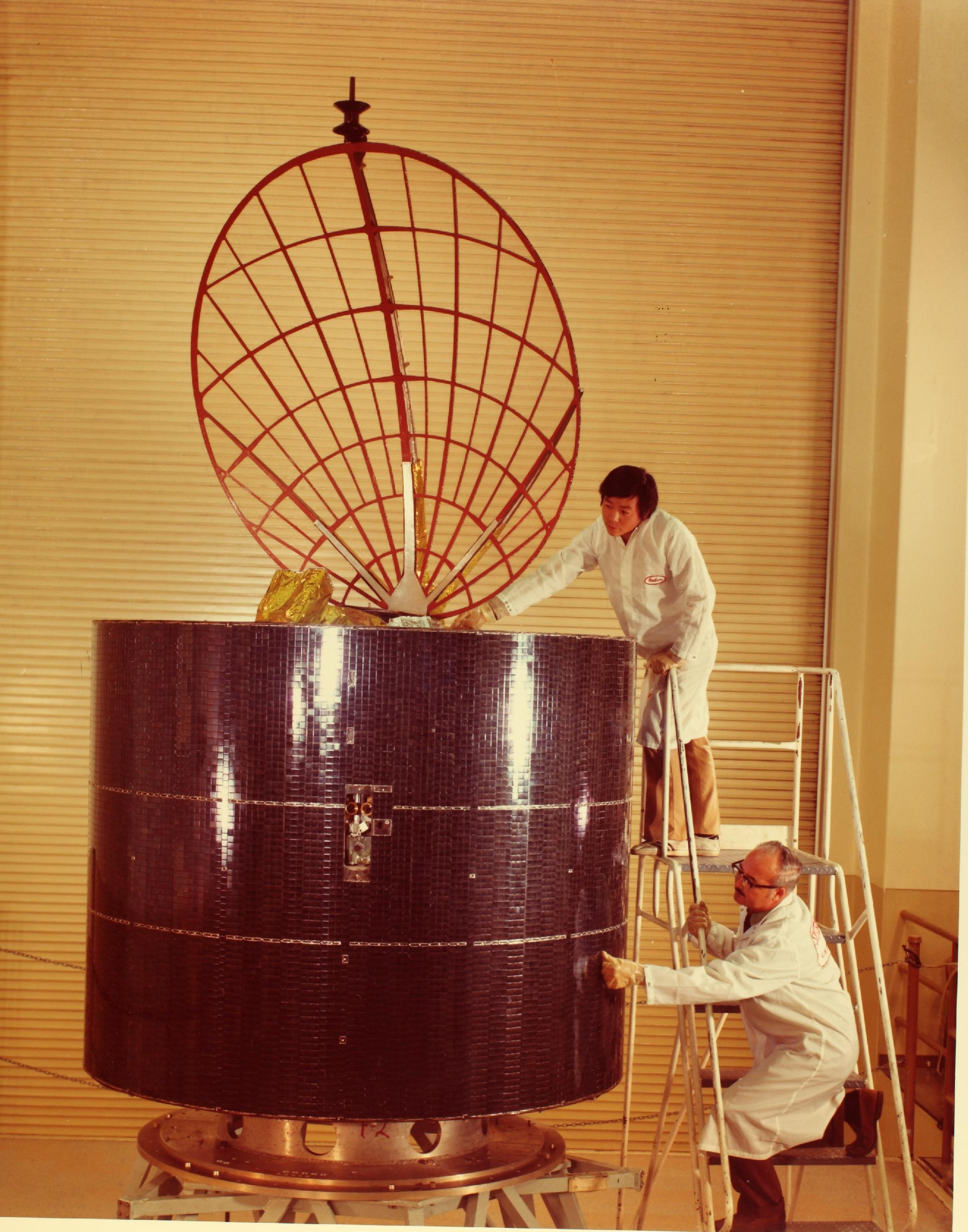 Inspection d'Anik (A1 ou A2) vers 1972-1973